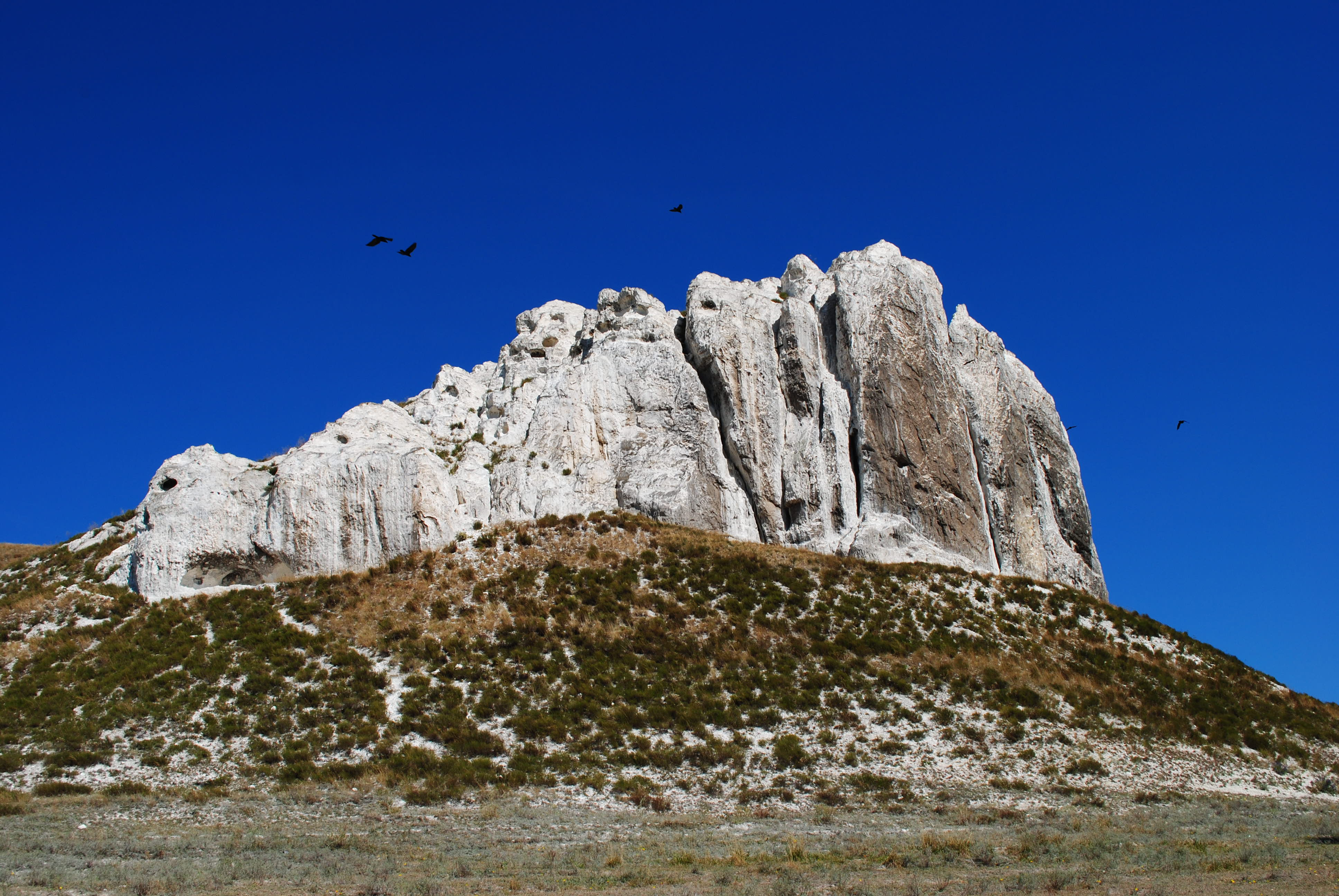 Скалообразное обнажение верхнего мела — геологический памятник природы. Возраст меловой горы — 90 миллионов лет. Гора состоит из отложений последнего периода мезозойской эры, которые сформировались в чистых тёплых морских водах из небольших морских организмов с известковым скелетом.